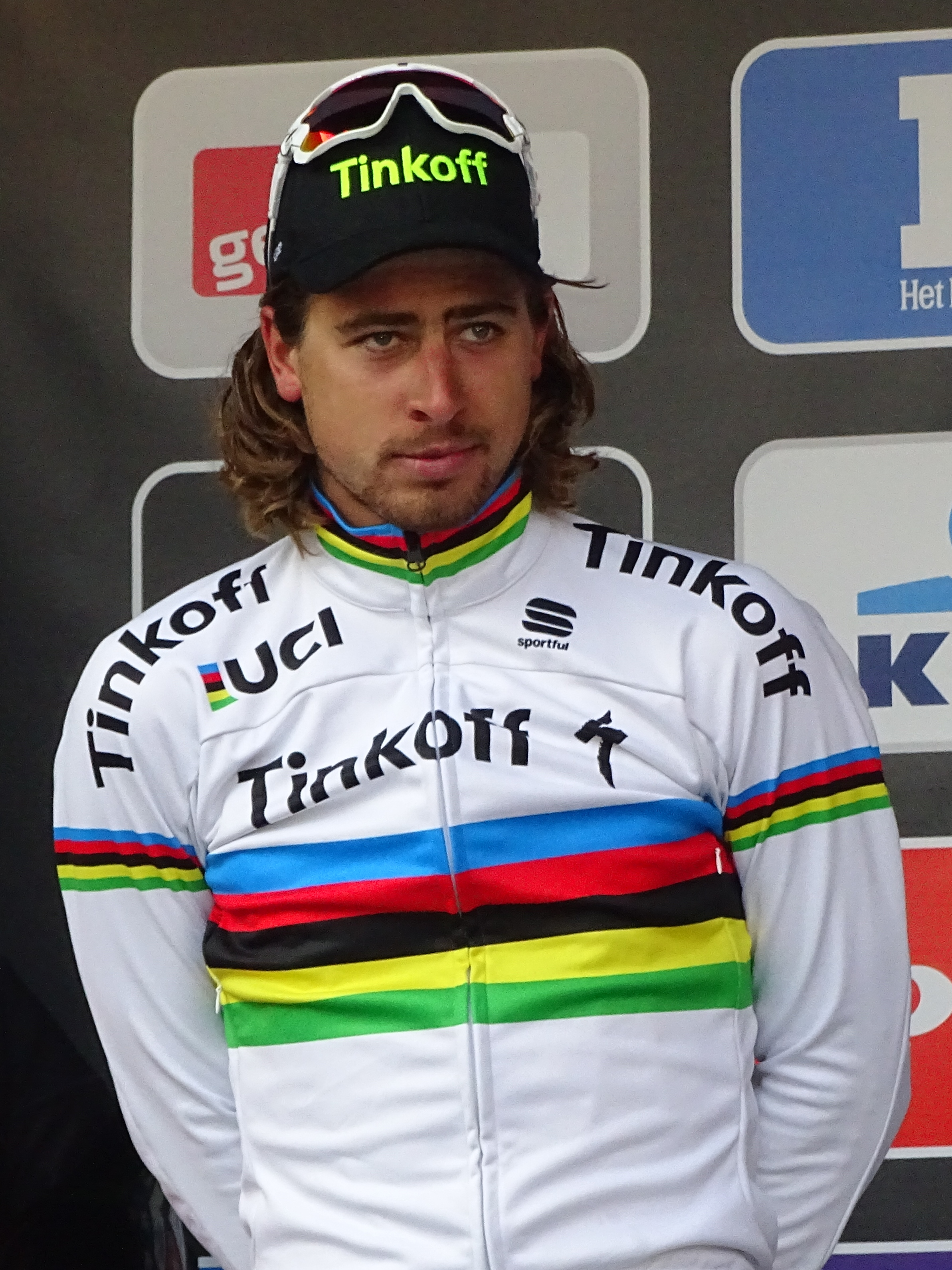 Reportage réalisé le samedi 27 février à l'occasion du départ et de l'arrivée du Circuit Het Nieuwsblad 2016 et de l'arrivée du Circuit Het Nieuwsblad féminin 2016 à Gand, Belgique.